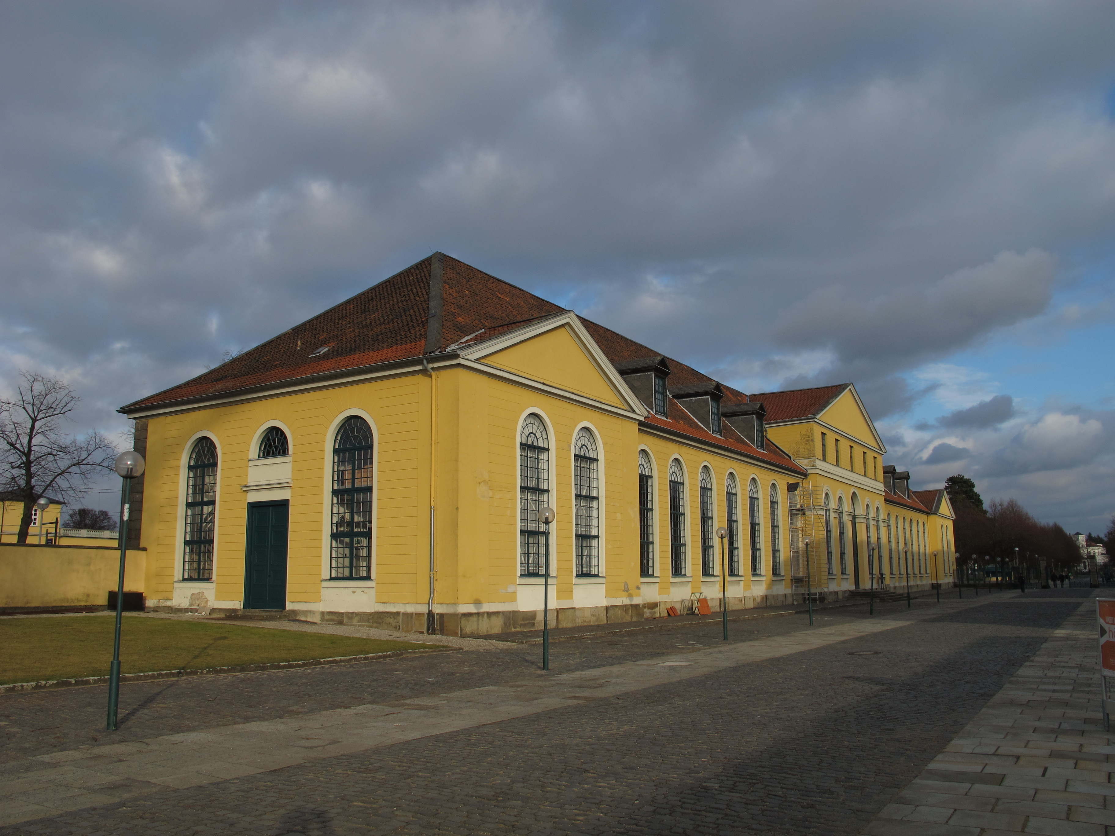 Großer Garten in Hannover-Herrenhausen: Orangerie